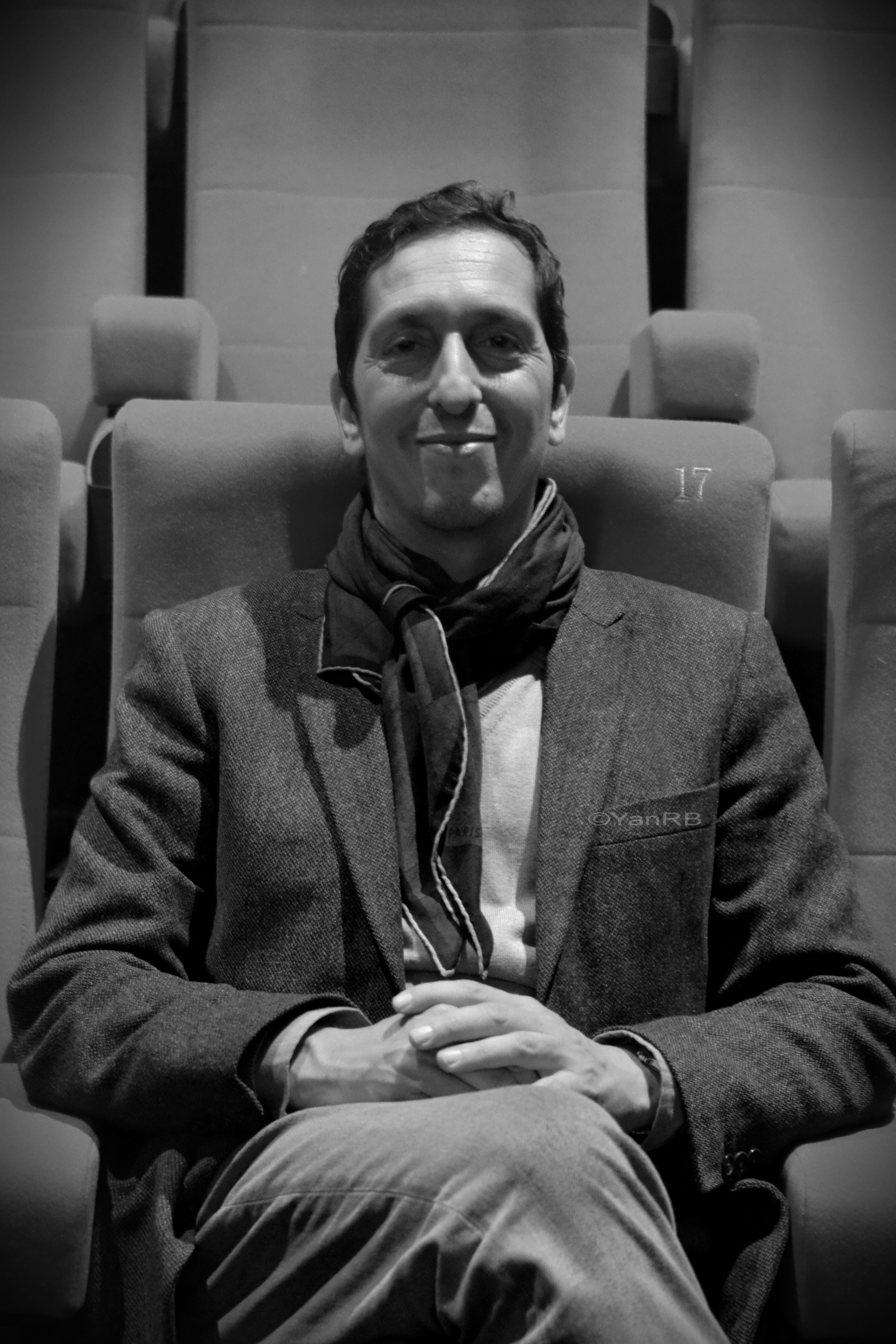 Stéphane Foenkinos av1er du film Jalouse ,à Toulouse,au Gaumont Wilson le 21 octobre 2017